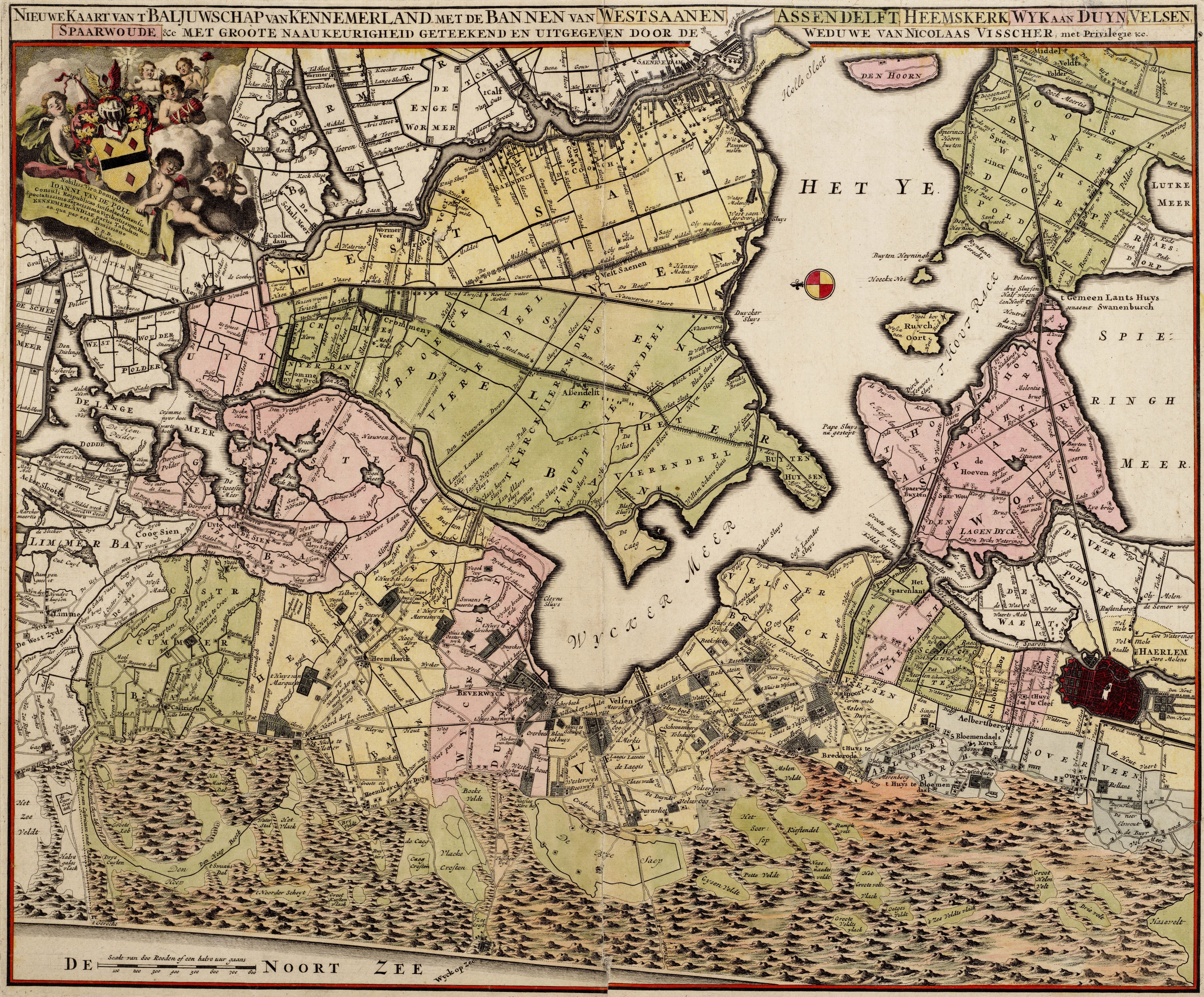 Nieuwe kaart van 't baljuwschap van Kennemerland met de bannen van Westsaanen, Assendelft, Heemskerk, Wijk aan Duyn, Velzen, Spaarnwoude etc. met groote naaukeurigheid geteekend en uitgegeven door de weduwe van Nicolaas Visscher met privilege &c. Oosten boven.